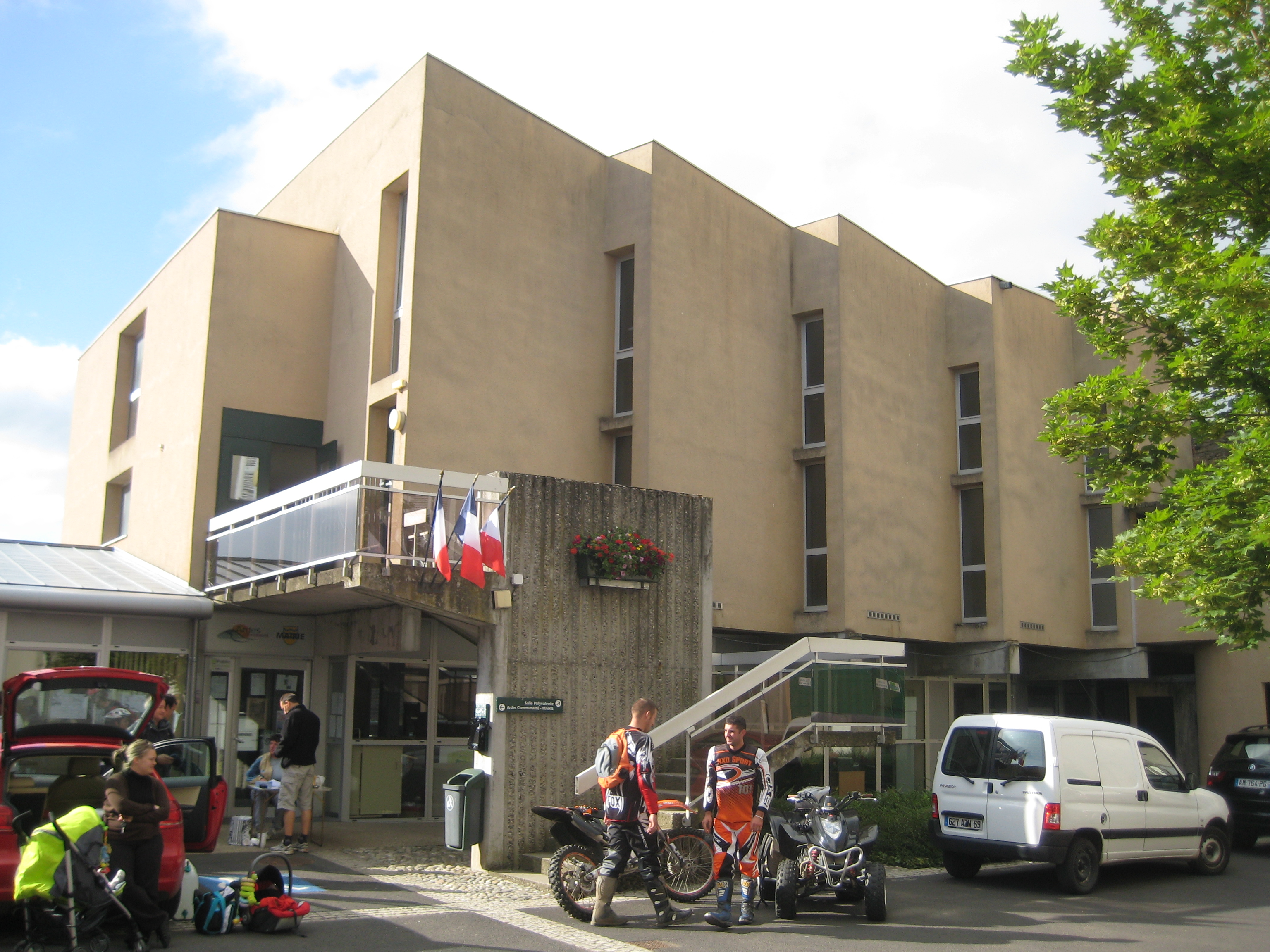 Mairie d'Ardes